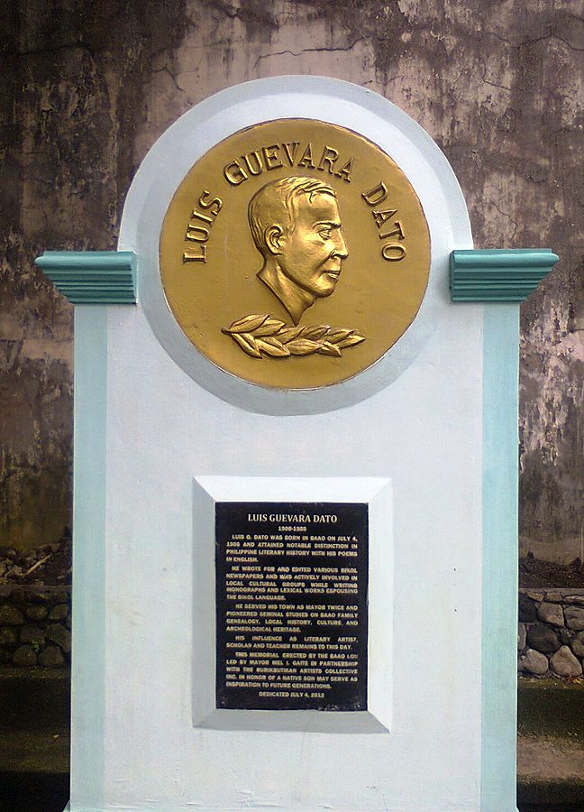 Bikol Central: Pagromdom k Dato